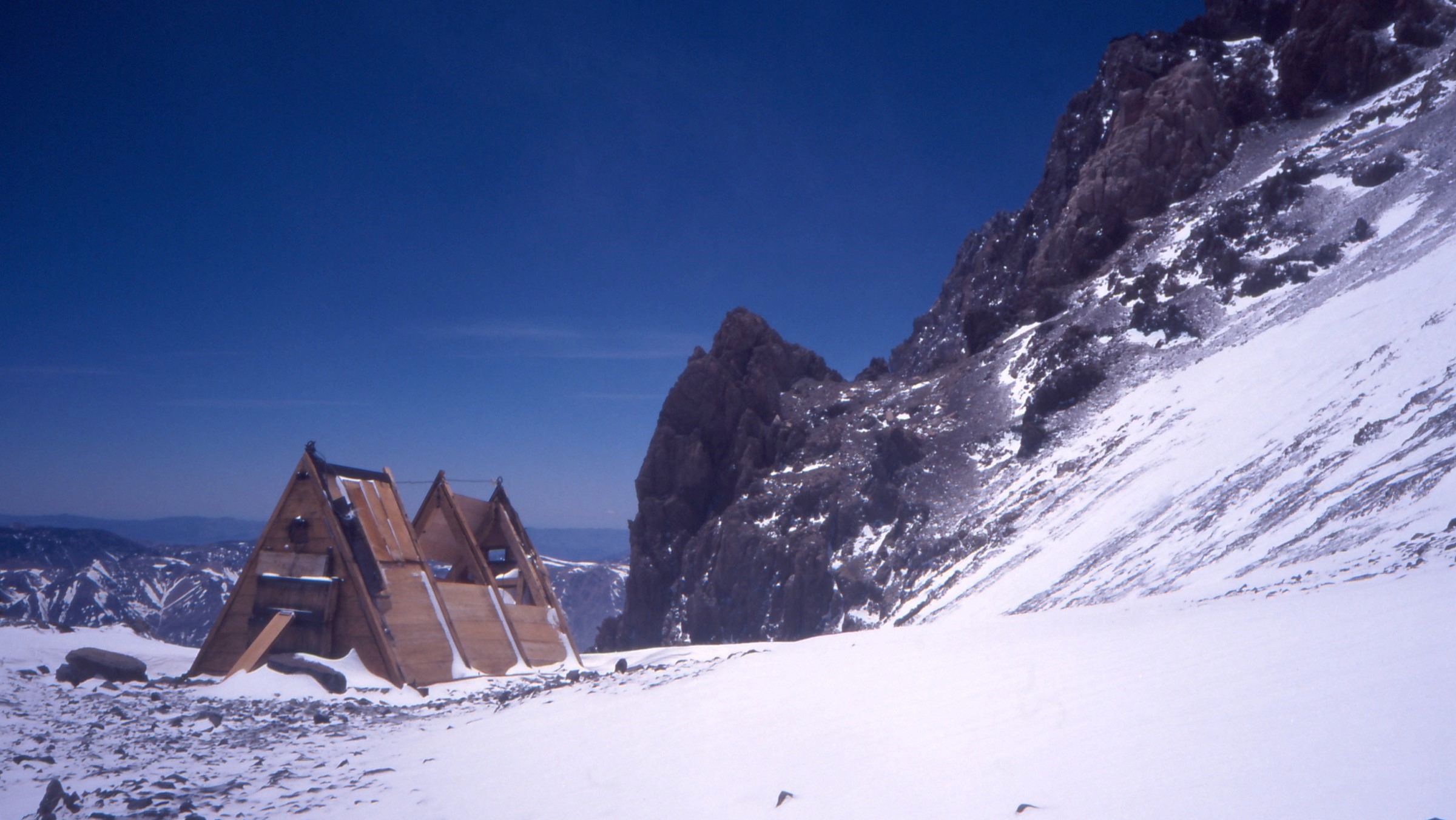 Verfallene Biwakschachtel "Independencia" auf 6400 m Höhe am Aconcagua, Argentinien.